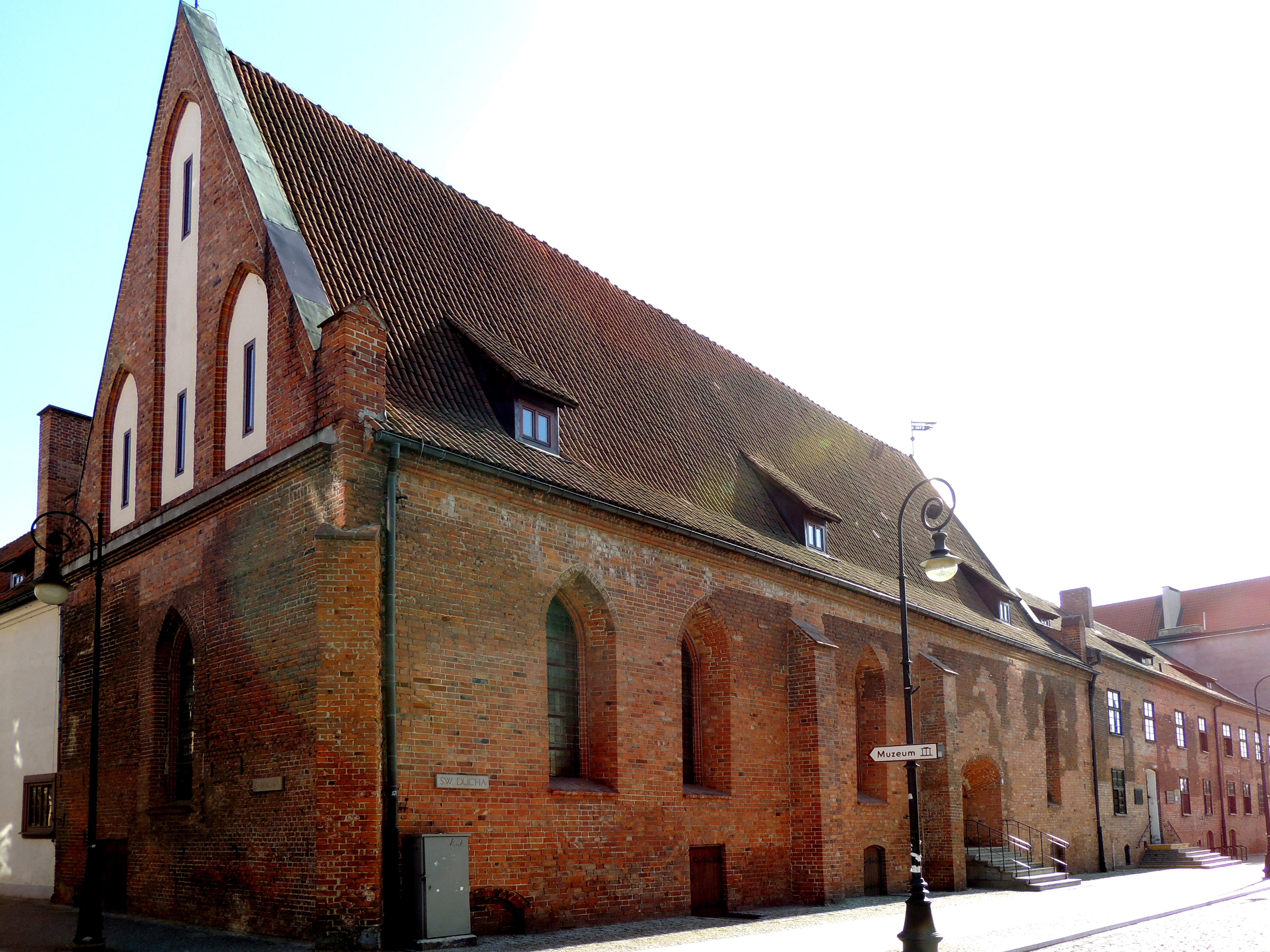 Elbląg, kościół p.w. Św. Ducha, ob. biblioteka, 2 poł. XIII, XVII, 1968-1979